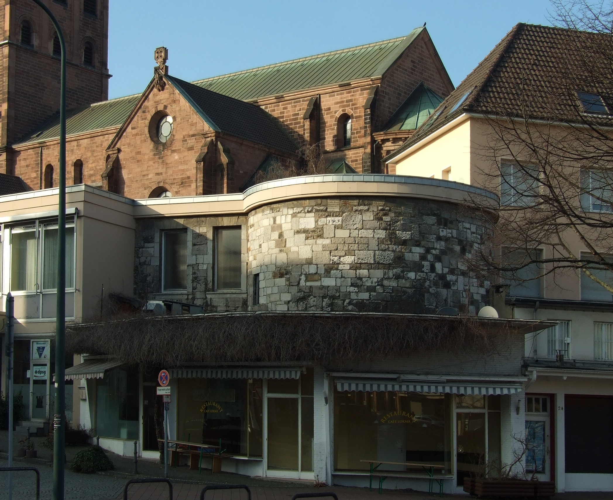 Adalbertsturm, Teil der ehm. äußeren Stadtmauer Aachens